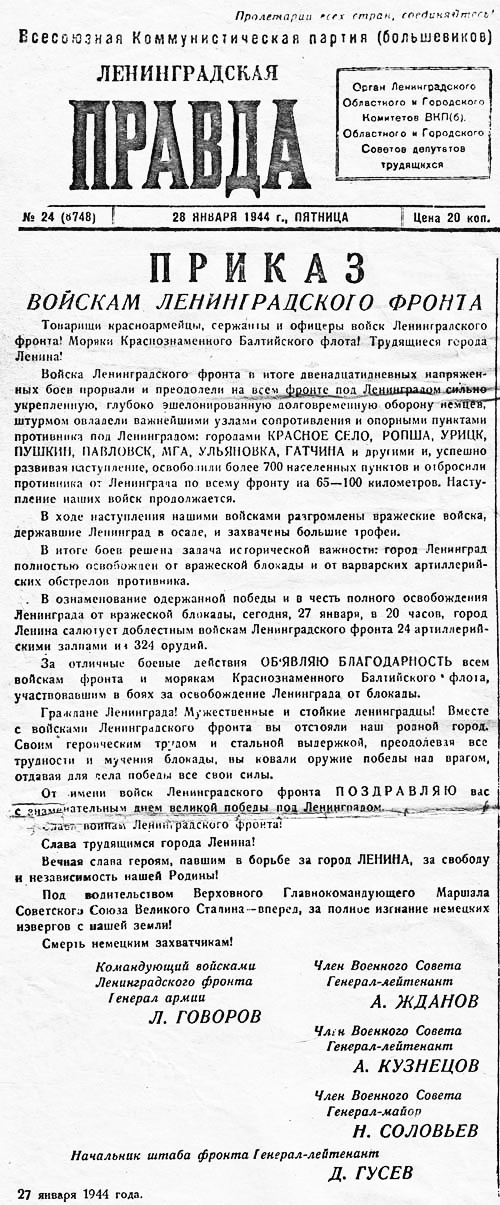 Приказ войскам Ленинградского фронта от 27 января 1944 года о полном освобождении Ленинграда от вражеской блокады. Газета "Ленинградская правда", 28 января 1944 года.